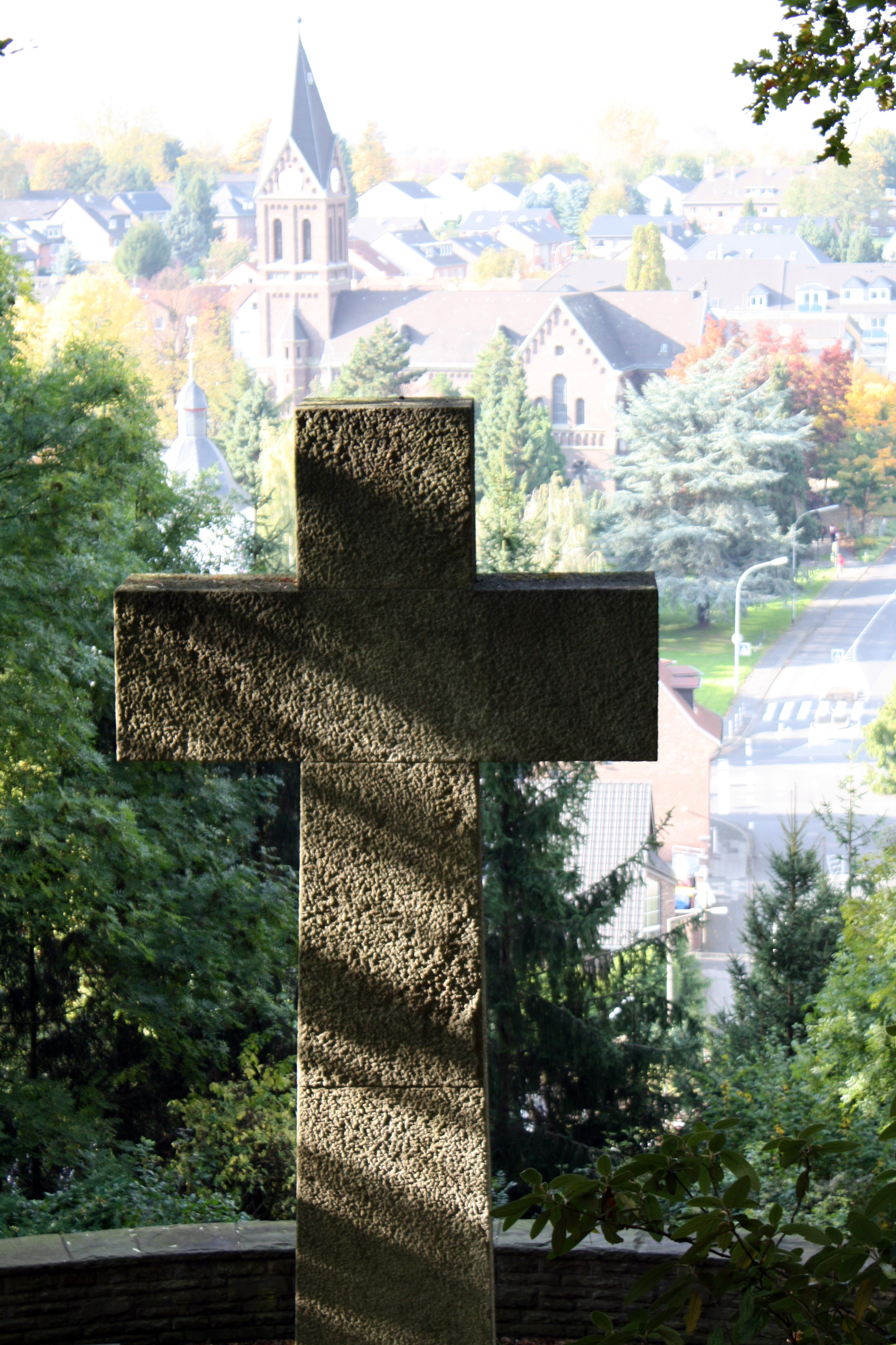 Alt-Hürth, Kriegerdenkmal